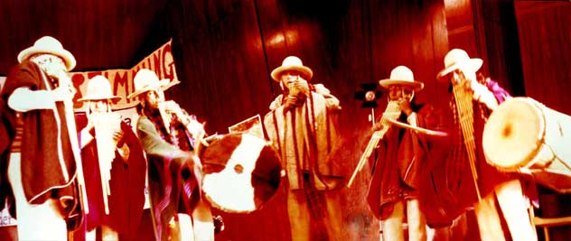 Los Rupay - Göttingen 1978